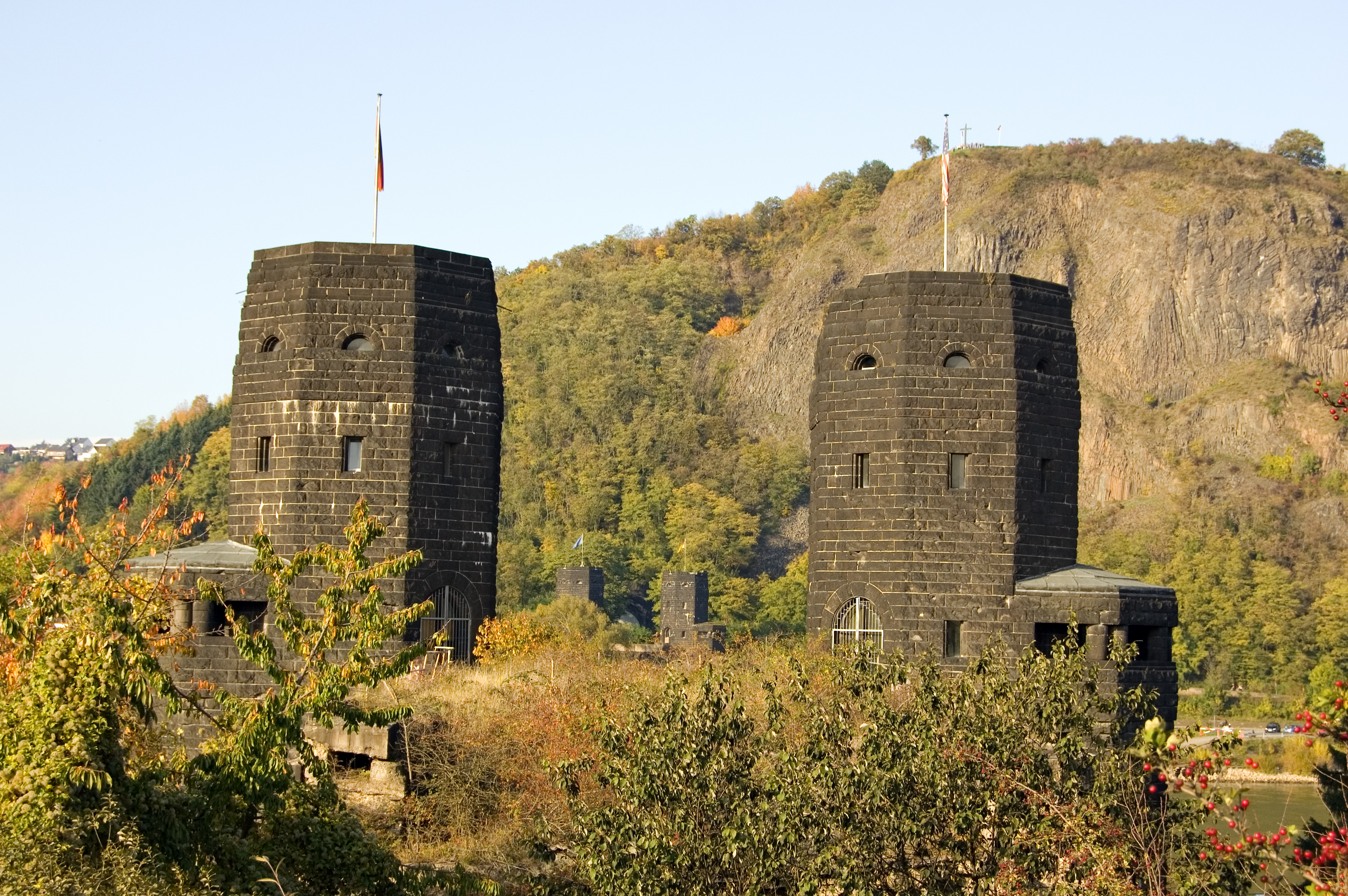 Brückentürme der ehemaligen Ludendorffbrücke, von Remagen aus gesehen. Im Hintergrund die Erpeler Ley.